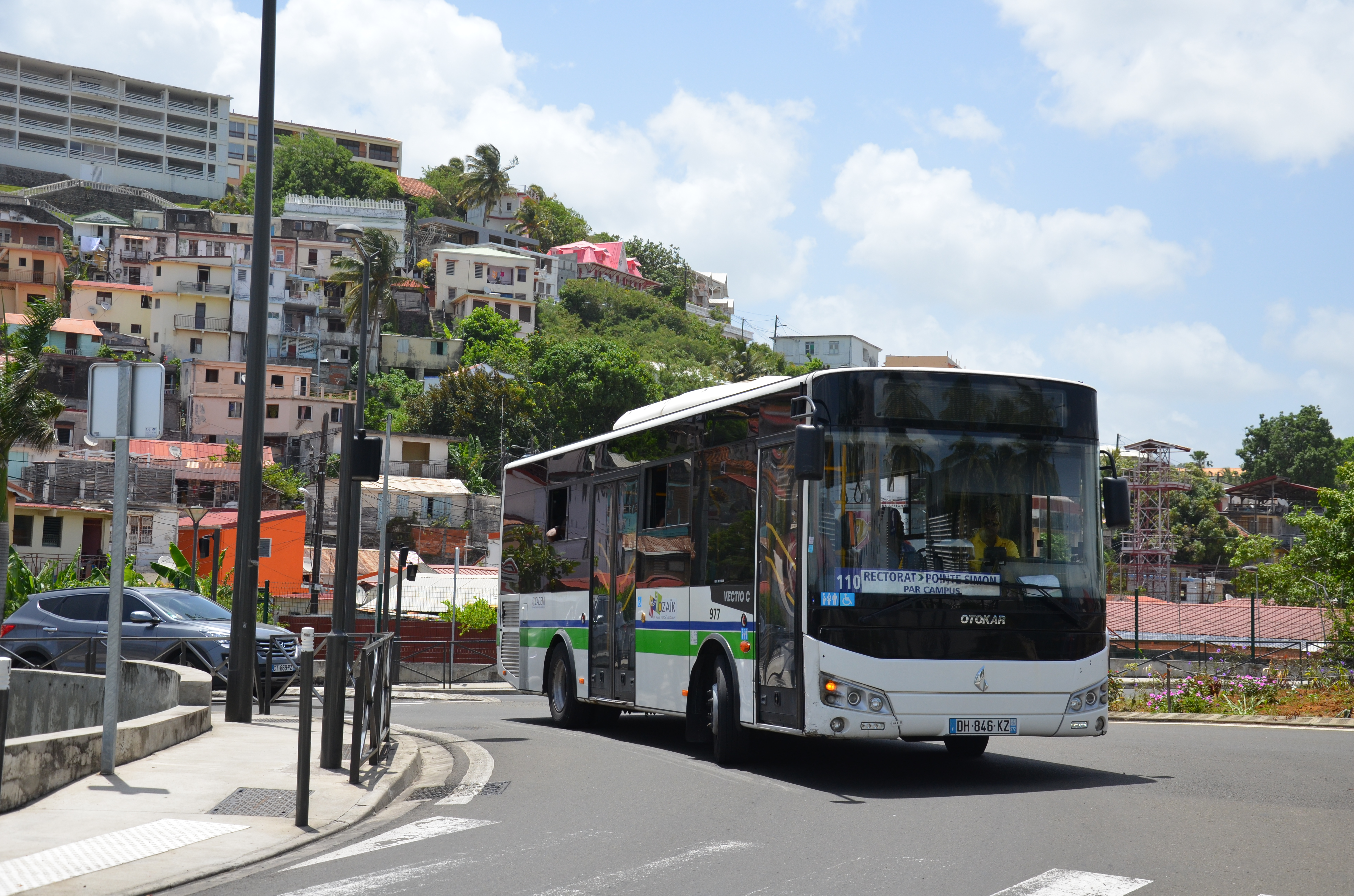 OTOKAR Vectio C n°977 MOZAIK sur la ligne 110 arrivant près de son terminus à Fort-de-France, Pointe Simon (Martinique).